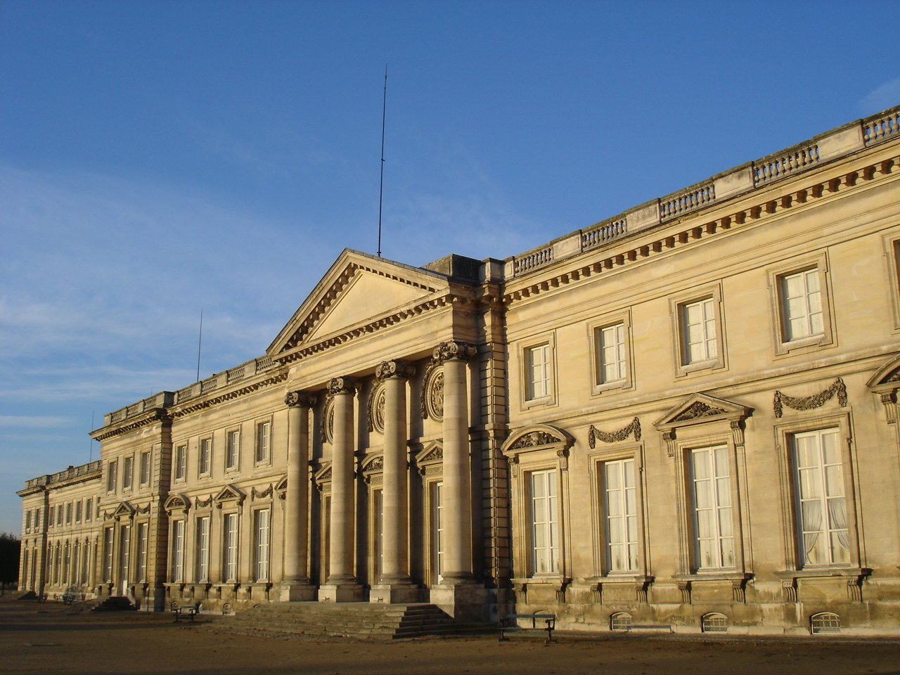 La façade côté jardin du château de Compiègne (Oise, France) ; le château actuel est élevé principalement de 1751 à 1789